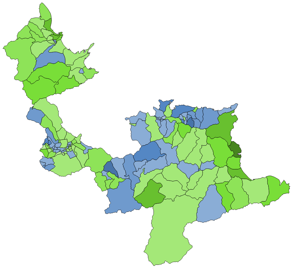 中文（台灣）: 顏色對照表